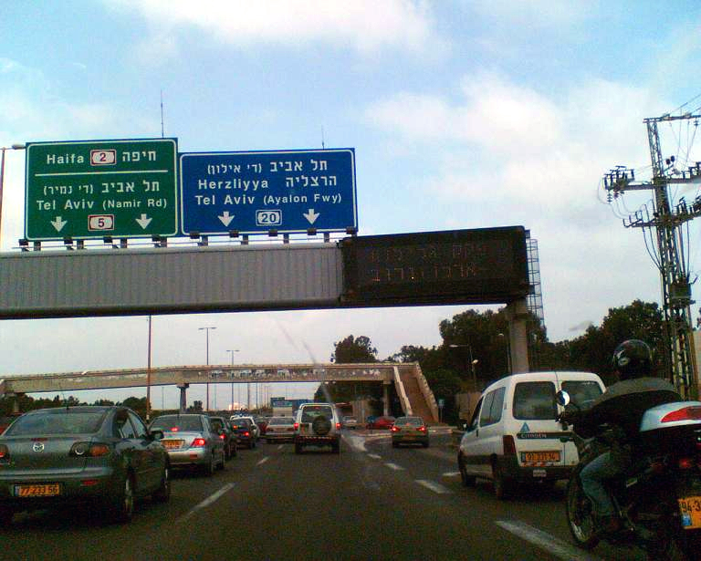 כביש 5 בואכה מחלף גלילות. צילם דוד שי.